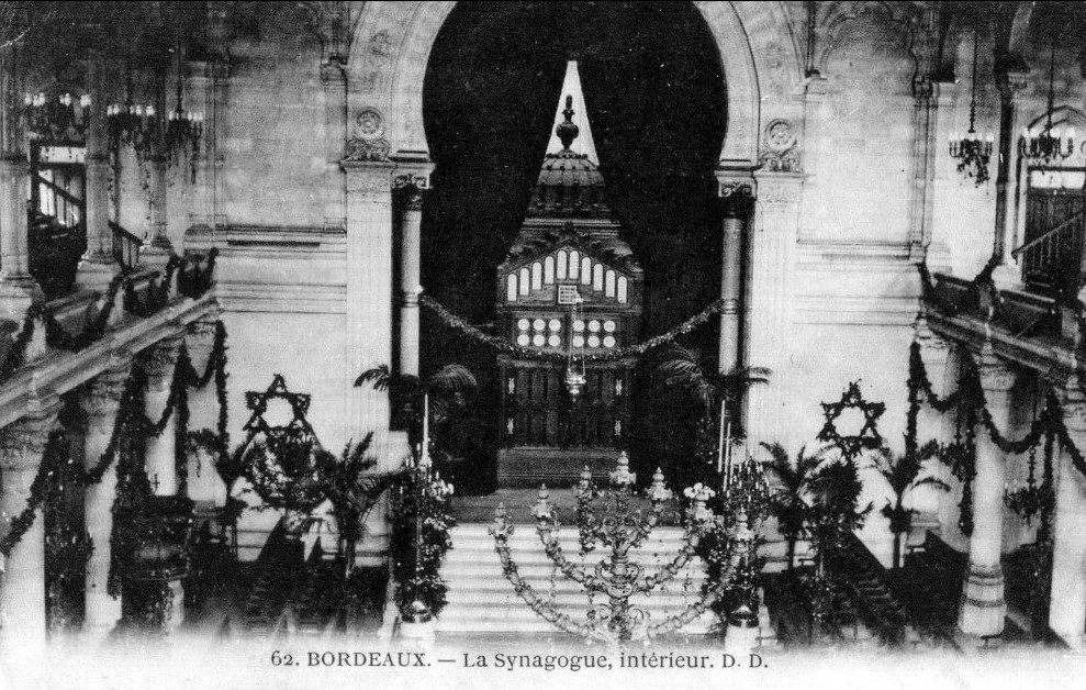 Bâtiment à Bordeaux